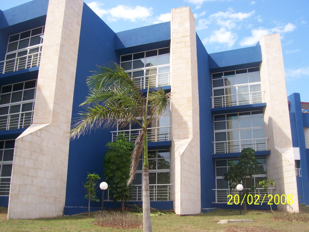 Docente de la Universidad de las Ciencias Informaticas